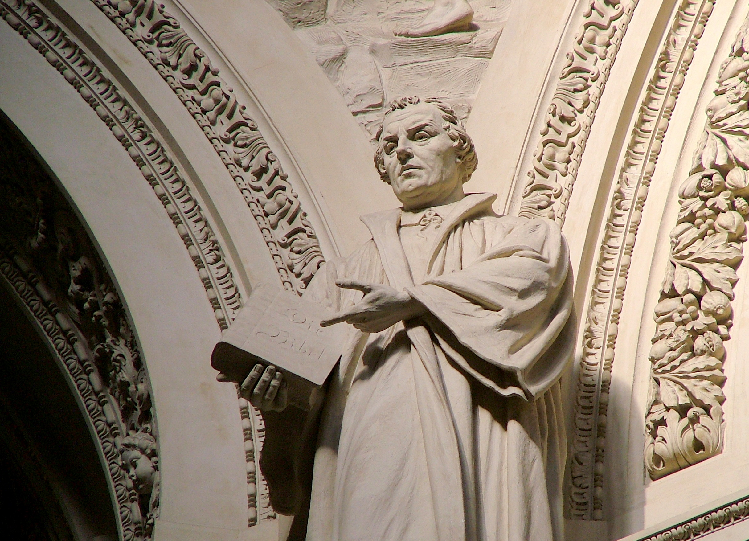 Martin Luther, Berliner Dom.